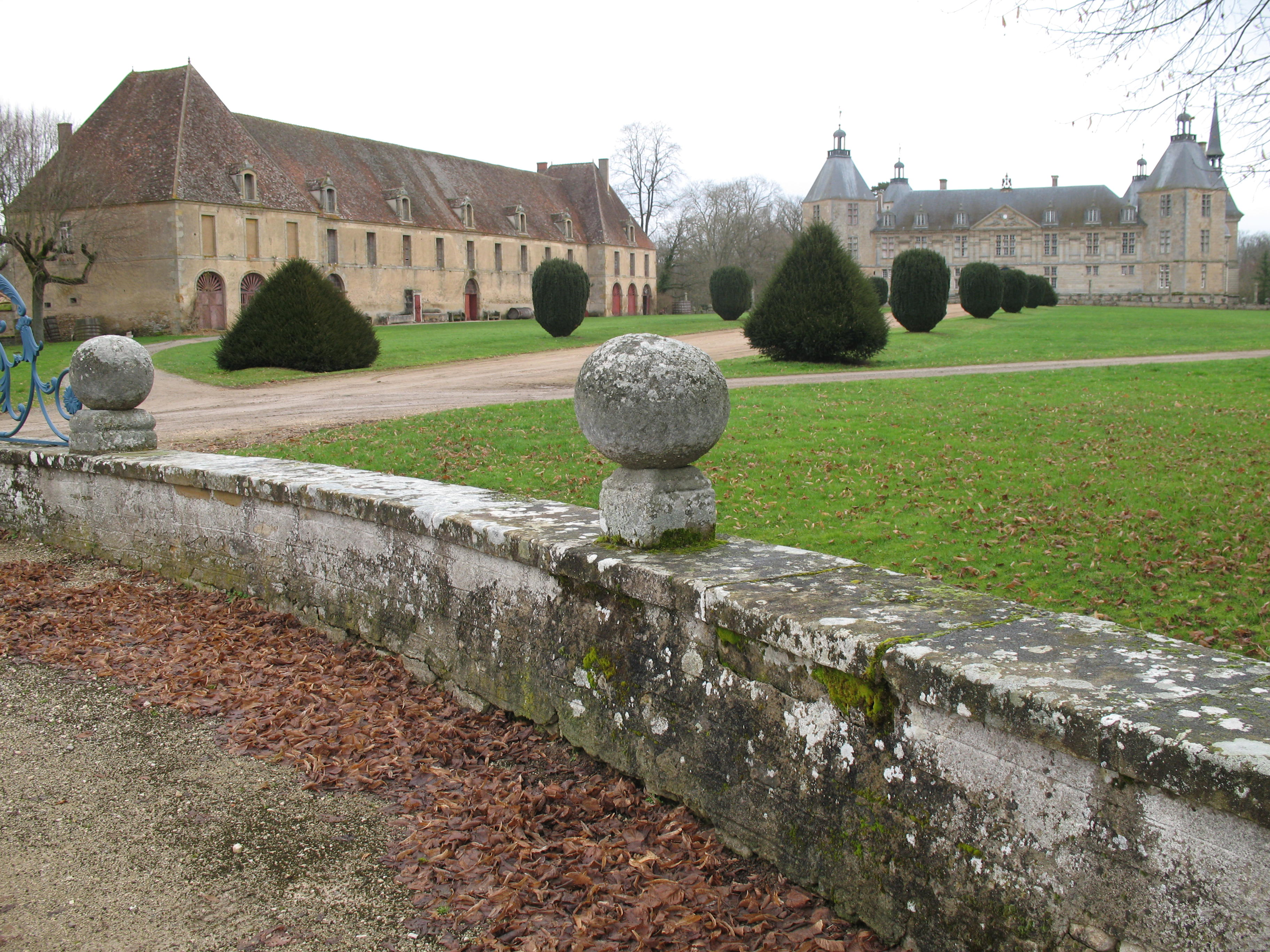 Communs du château de Sully (Saône-et-Loire), vus depuis l'entrée